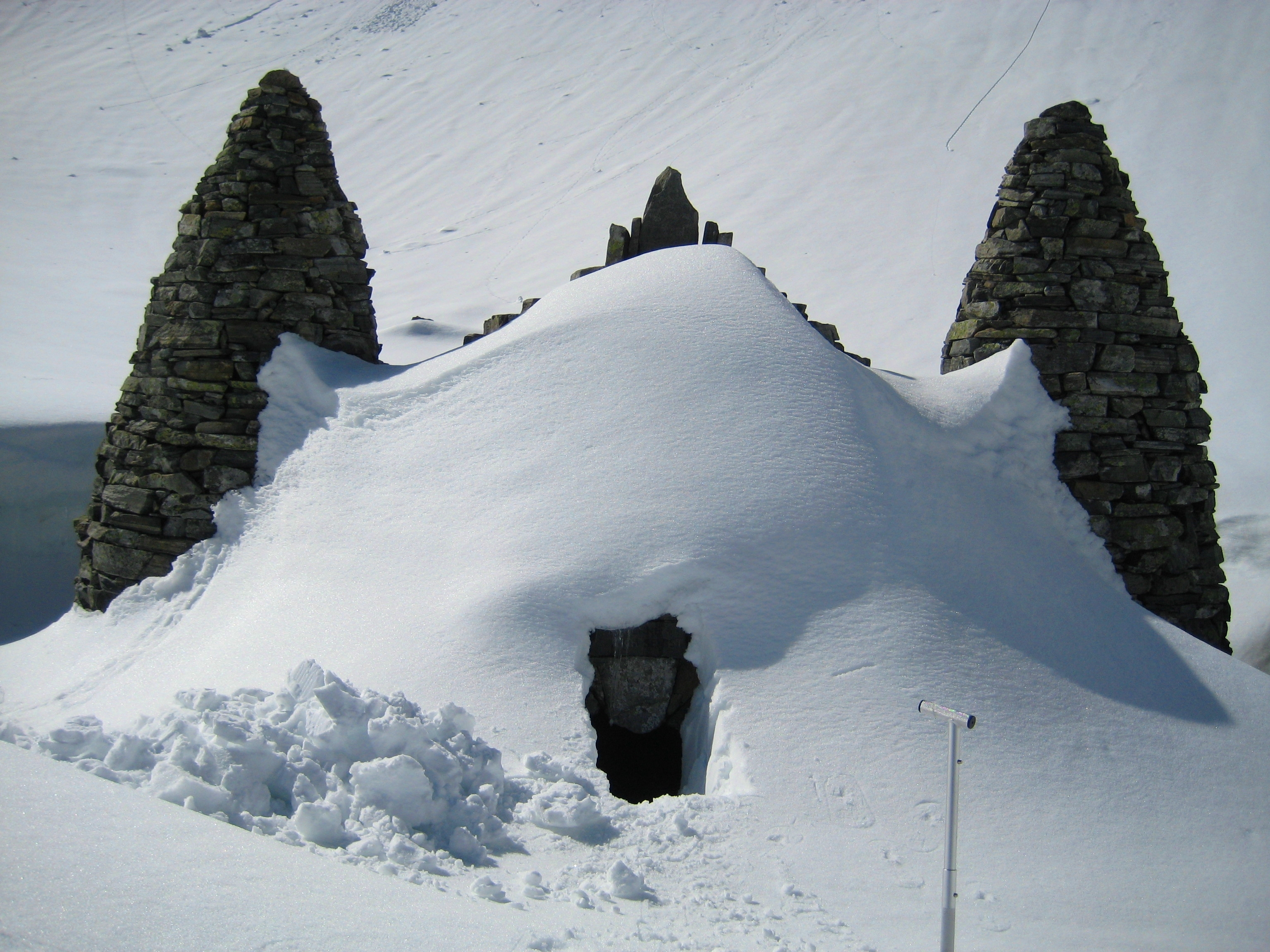 Der Apollontempel am Hundstalsee (Österreich) am 08.05.2008. Es ist Frühling, doch auf 2289 m über dem Meer herrscht noch tiefster Winter.